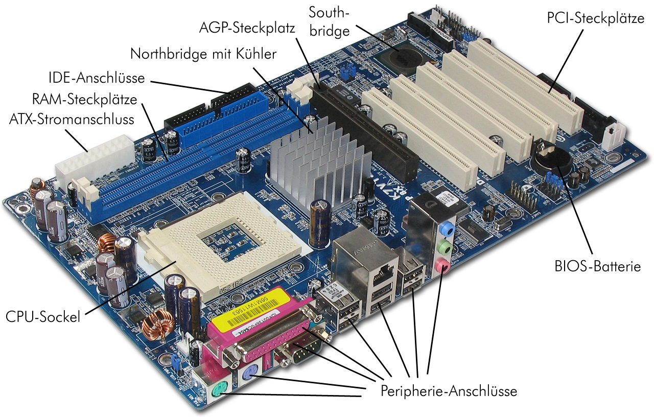 ASRock K7VT4A Pro – Mainboard / Motherboard / Hauptplatine / VIA KT400A chipset